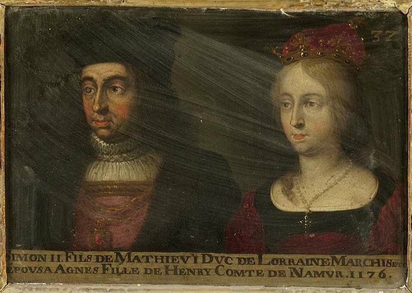 Portrait de Simon II, duc de Lorraine de 1176 à 1215, et de son épouse Agnès de Namur. Ce tableau fait partie d'une suite d'une soixantaine de double-portraits représentant les ducs et duchesses de Lorraine ainsi que leurs ancêtres supposés. La légende semble erronée car on ne connait à Simon II que deux épouses : Agnès de Valdenz et Ide de Mâcon. Musée des Offices, Florence (Inv. 1890, 670)